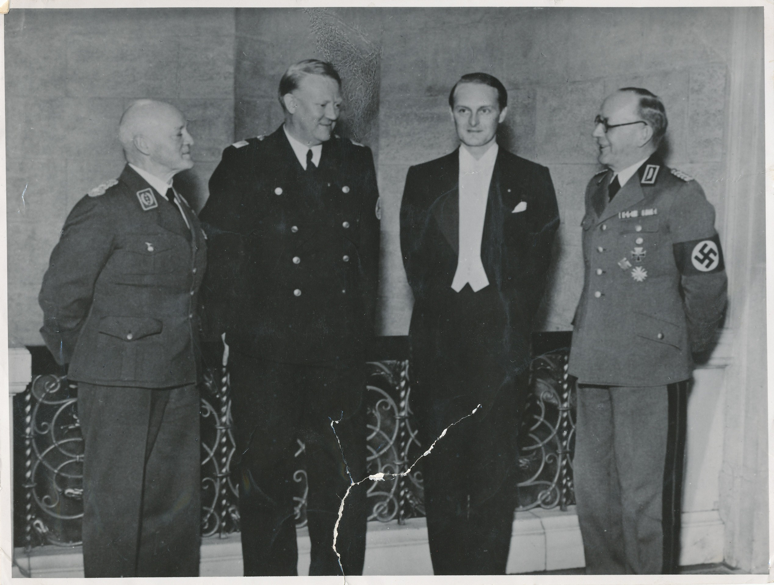 Ukjent datering. RA/PA-0739/U/0002 1054